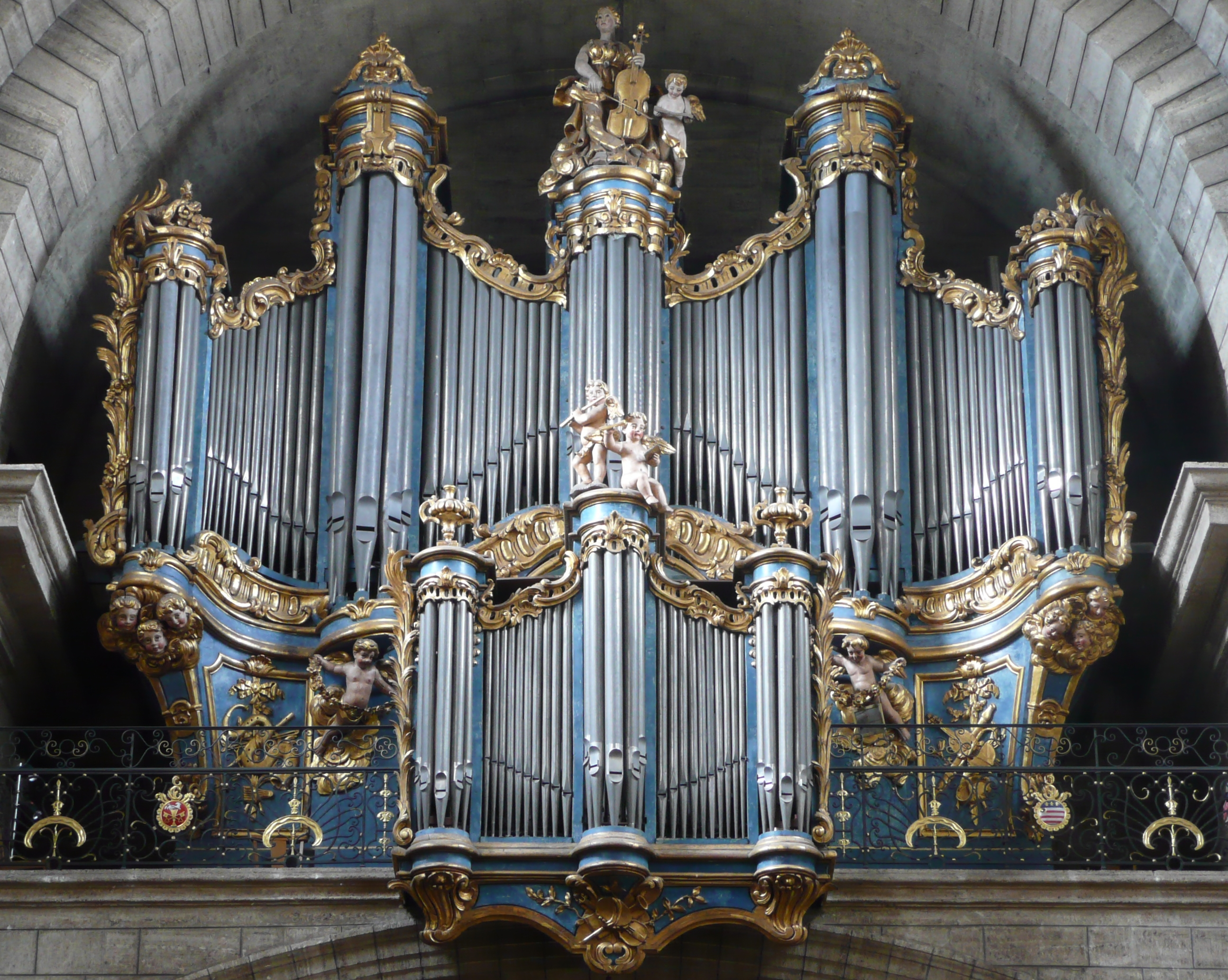 ce buffet a été édifié par le marseillais Louis Courdeau, dit "Provençal", d'après les plans de l'ingénieur Vidal révisés par l'organier parisien Renault; les sculptures sont des frères Mortreuil de Toulouse.